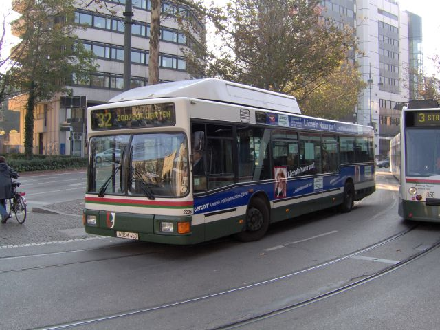 MAN NL 232 CNG Erdgas-I-Kleinbusse, Baujahr 1996; 9 Stück (2231 - 2239). Wagen Nr. 2235 am Königsplatz, mit Werbung für Labor Rager.